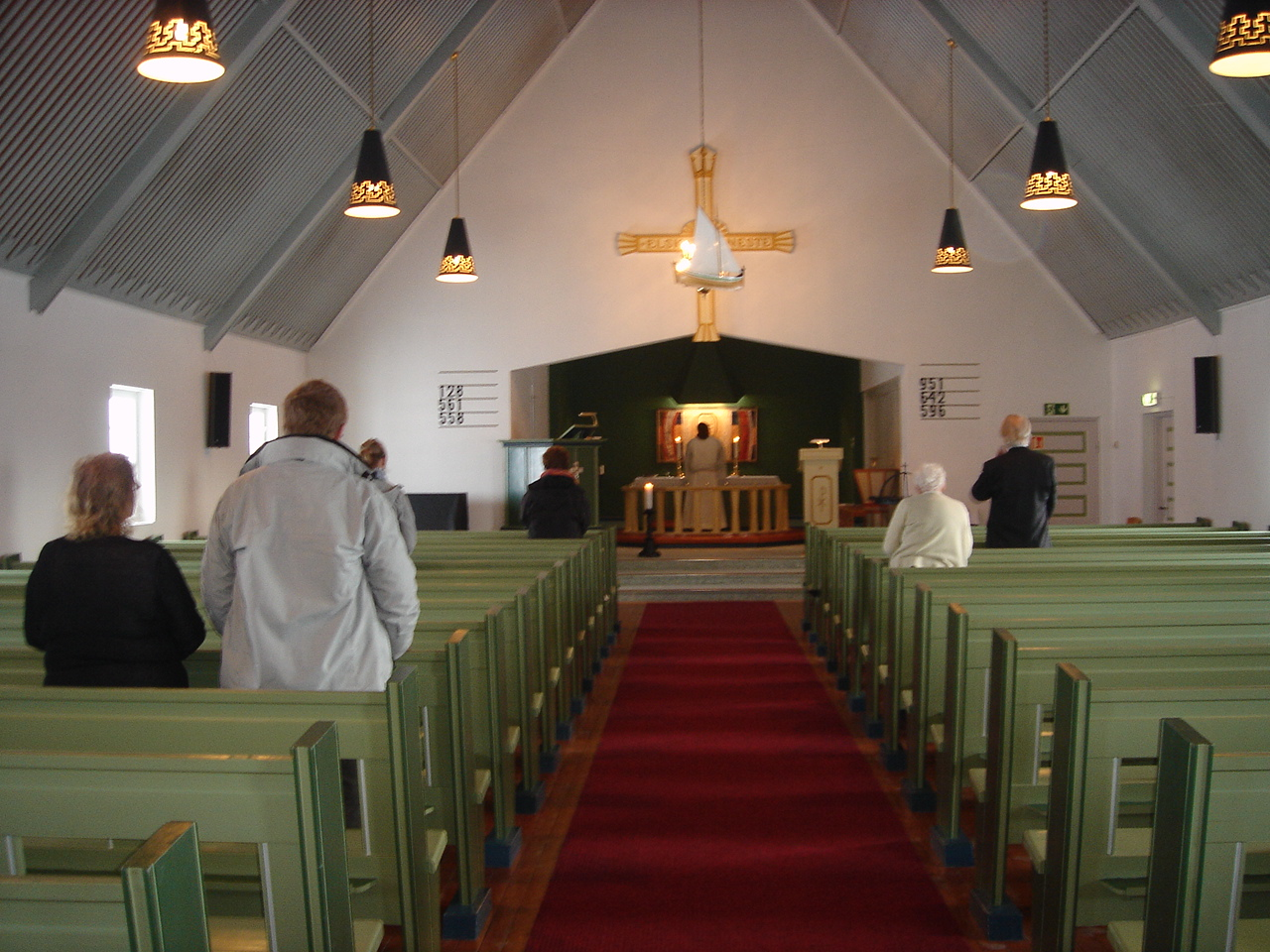 Nattverdliturgi i Gamvik kirke, Eucharist in Gamvik Church